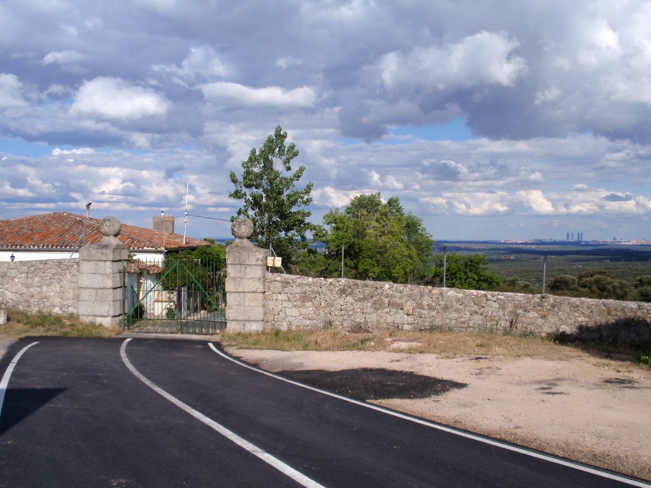 Torrelodones. Puerta de Acceso Monte de El Pardo. Al fondo las Cuatro Torres de Madrid.